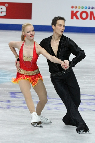 Габриэла Кубова и Дмитрий Киселев (Чехия) на чемпионате Европы по фигурному катанию 2012